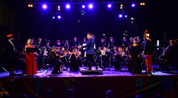 Escena de L'Aplec del Remei a Ripollet